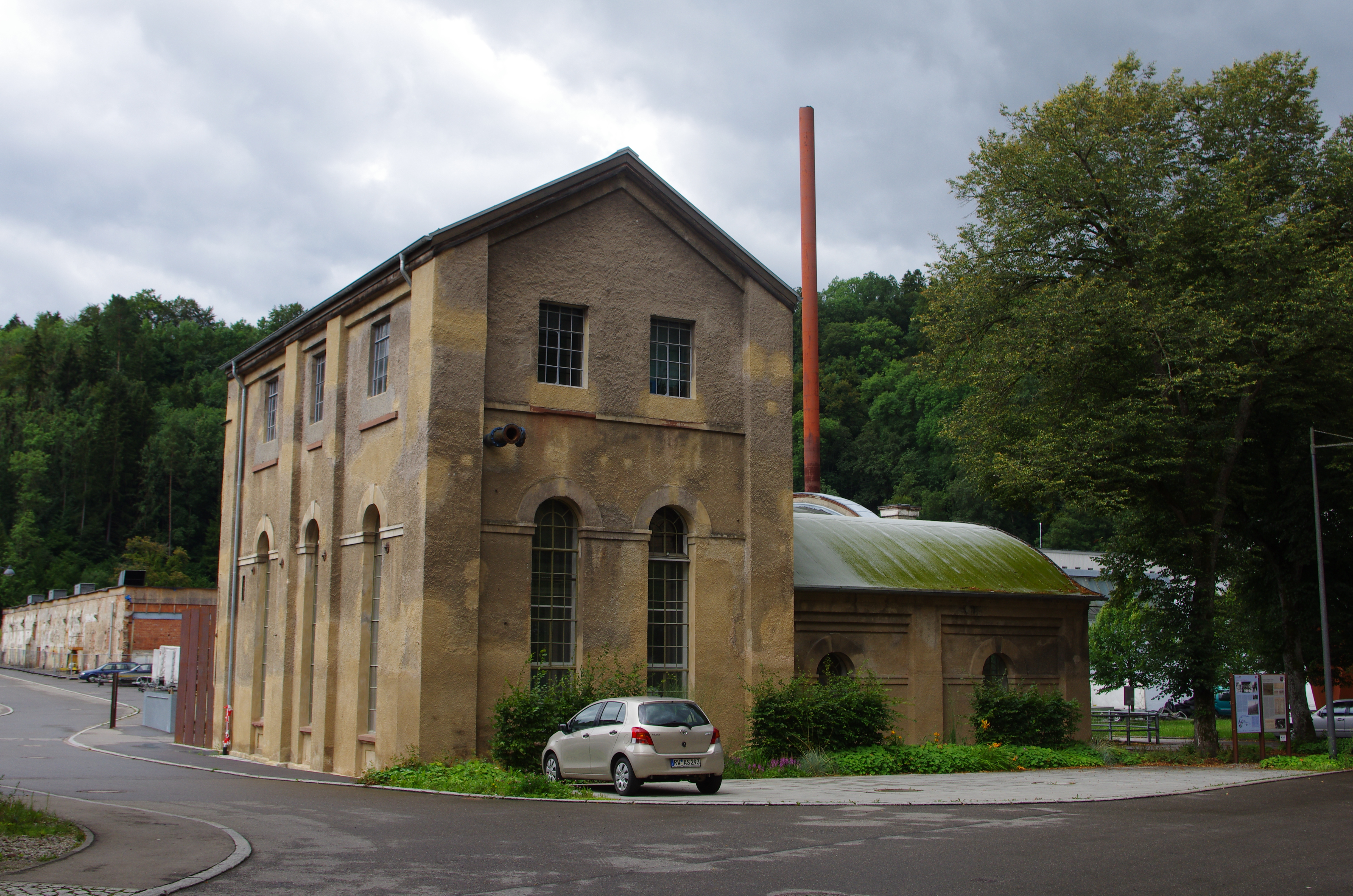 Filter- und und Pumpenhaus, Neckarstraße 202, auf dem Gelände der ehemaligen Pulverfabrik Rottweil